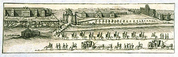 Дворцовый ансамбль в Лефортово (Зимний и Летний Анненгофы) Фрагмент гравюры И. Соколова «Церемония шествия Елизаветы Петровны в Москву» из коронационного альбома.